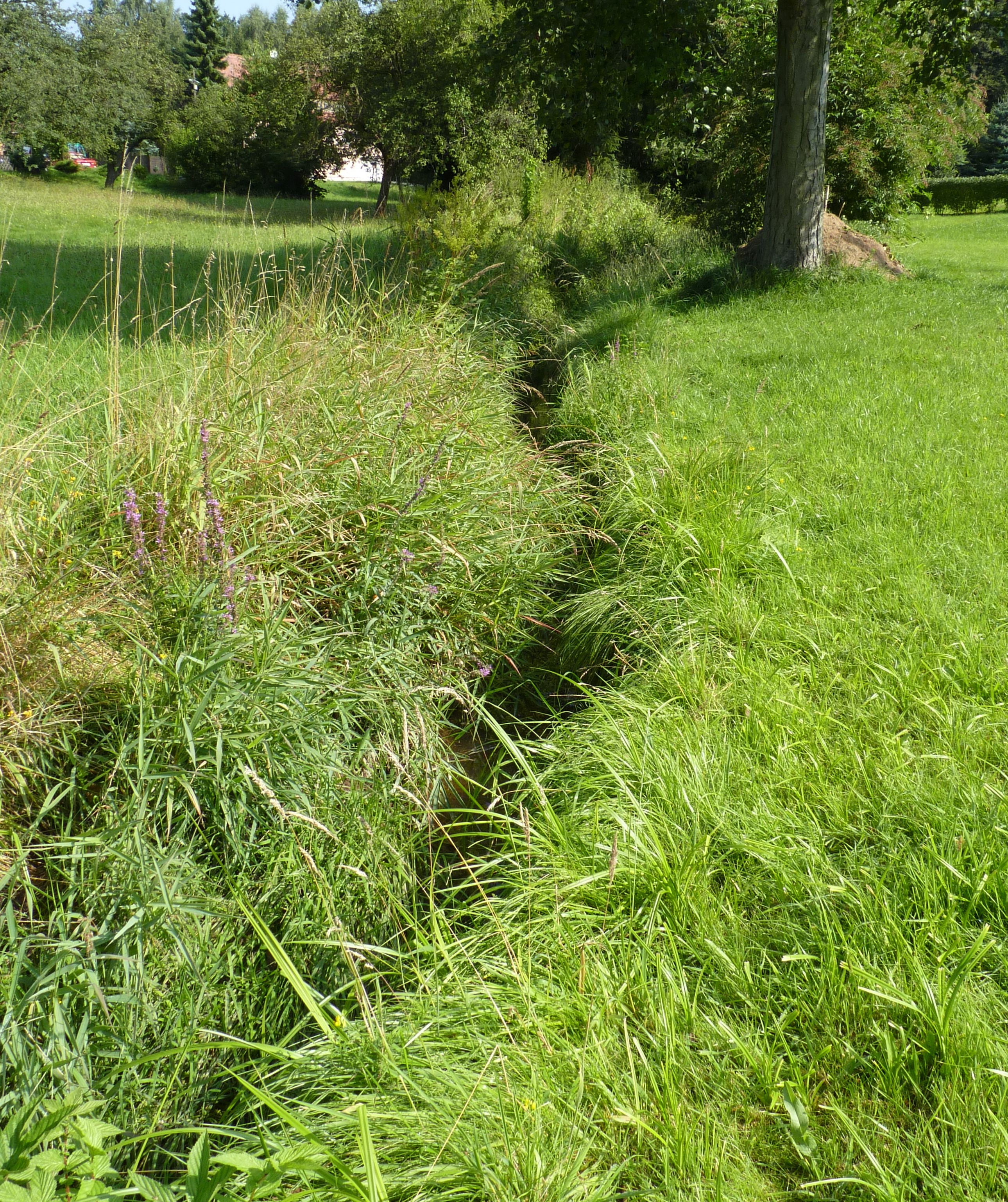 Das Grundwasser in Niederoderwitz.